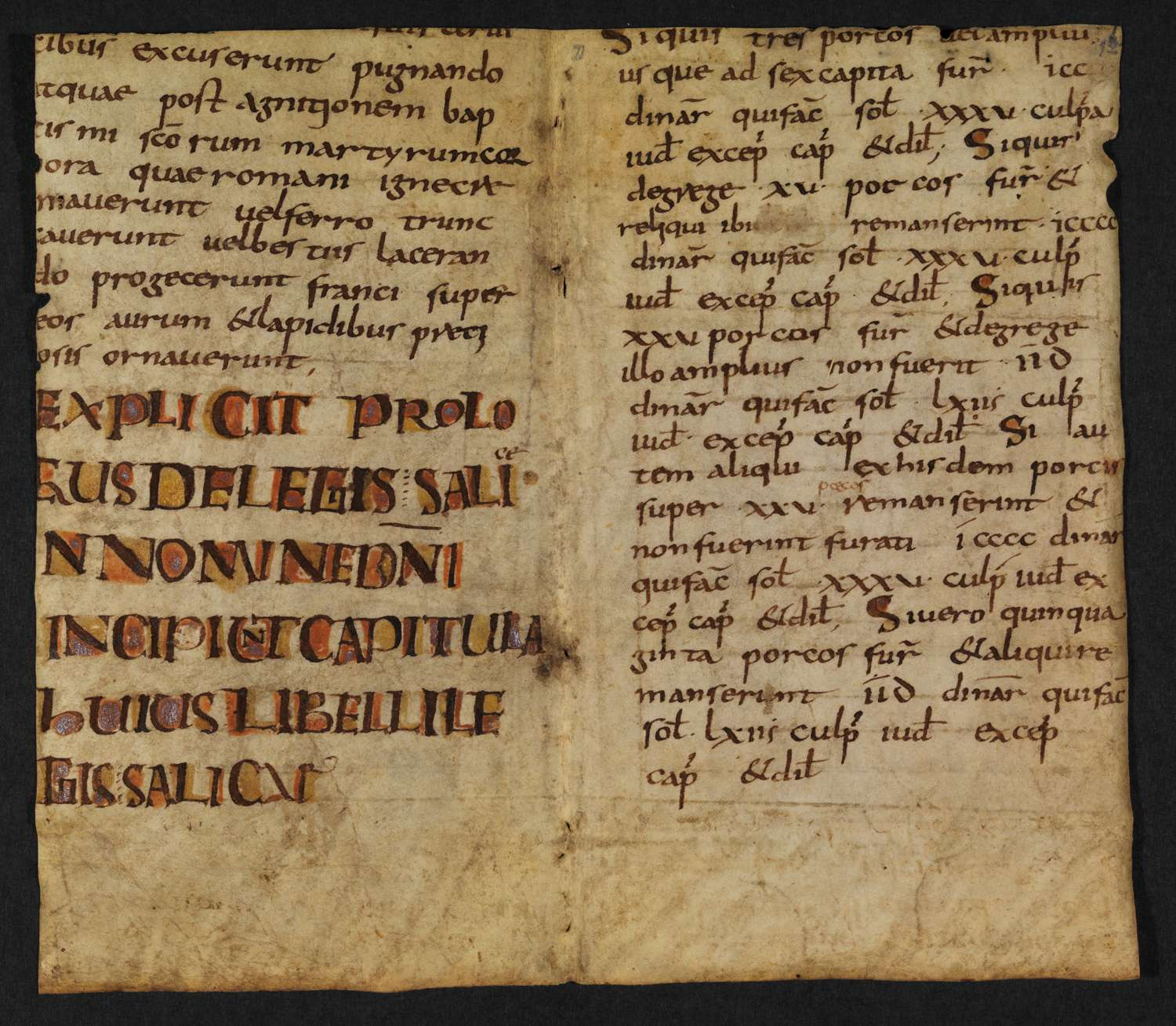 Lex Salica